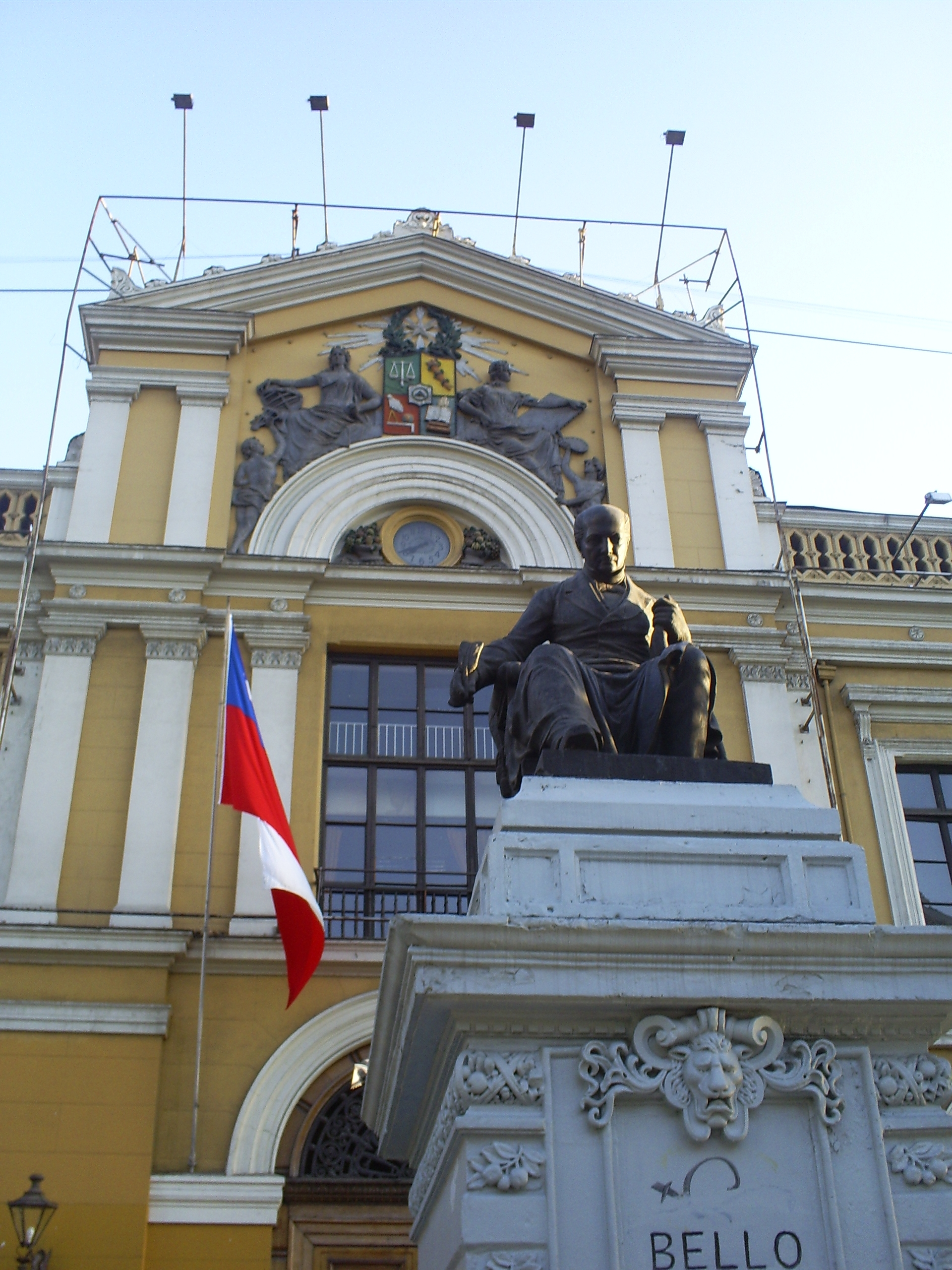 Fachada de la Casa Central Universidad de Chile, y estatua Andres Bello.